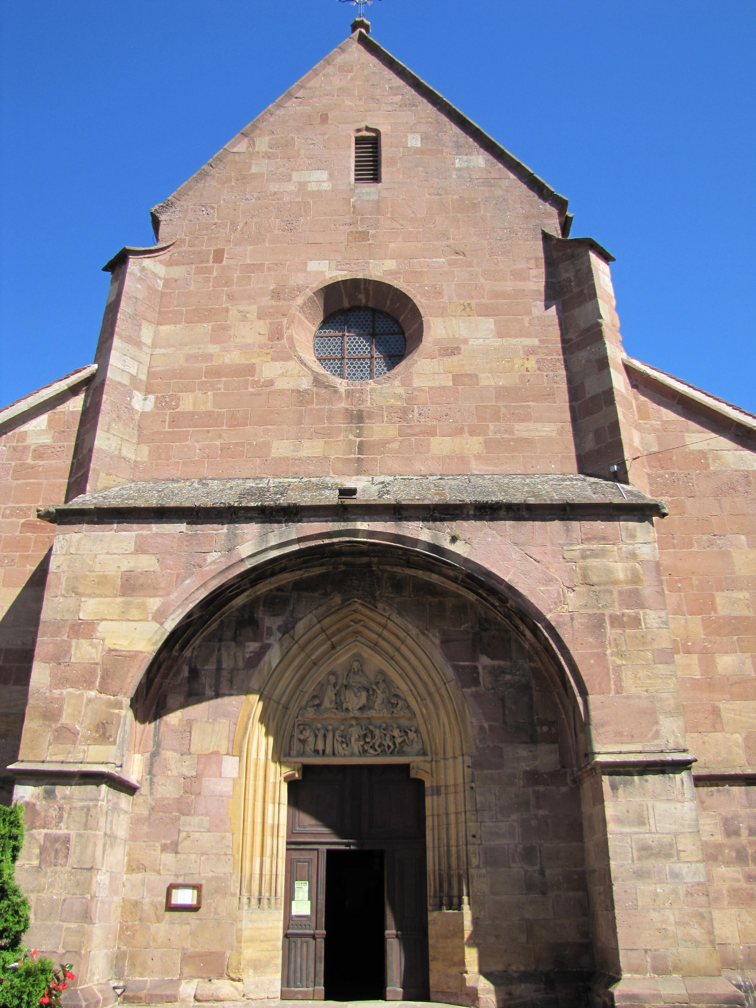 Alsace, Église Saint-Maurice de Soultz-Haut-Rhin (PA00085681, IA00111946): Portail avec tympan néo-gothique.